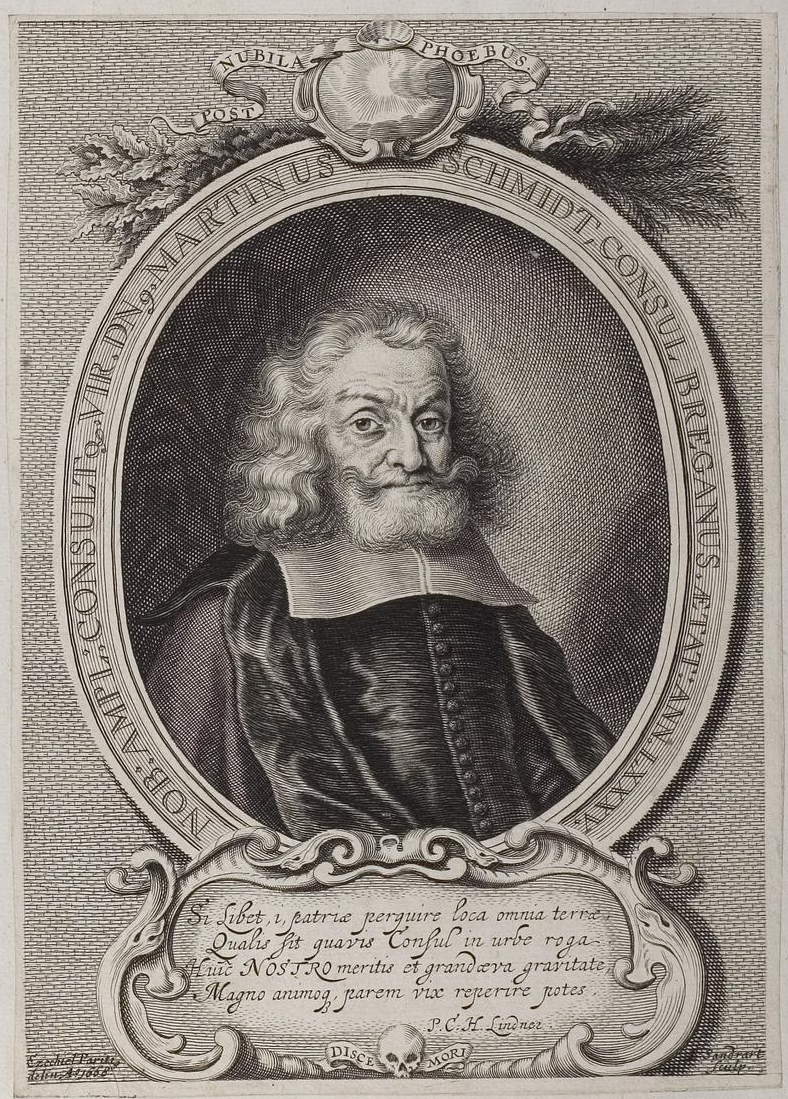 Martin Schmidt (1583–1668), Bürgermeister in Brieg